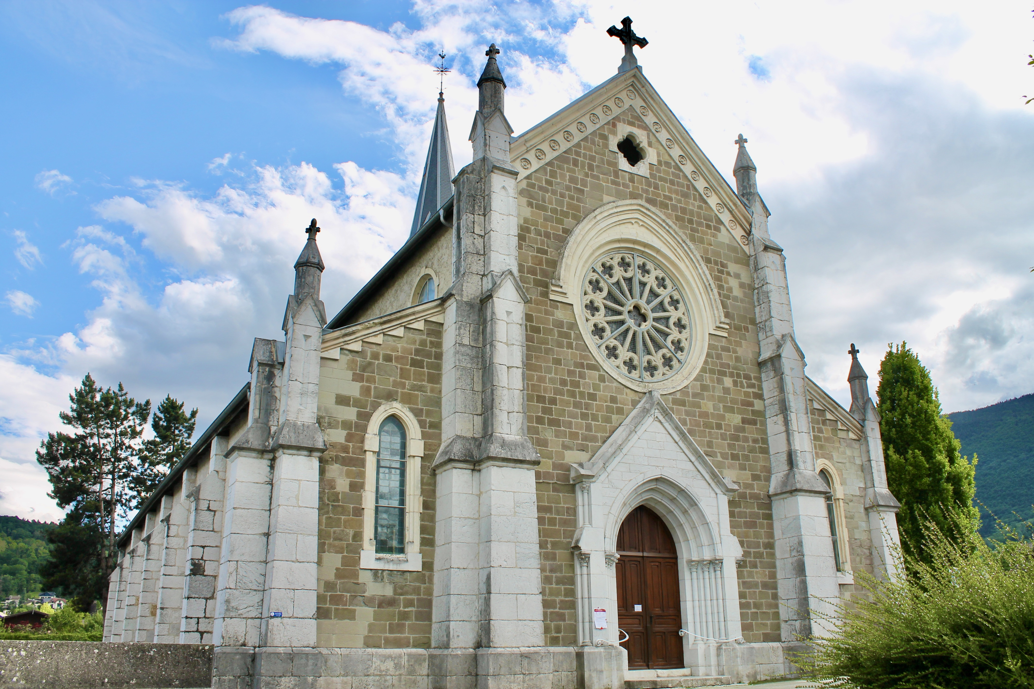 Façade de l'église Saint-Nicolas de Saint-Jorioz